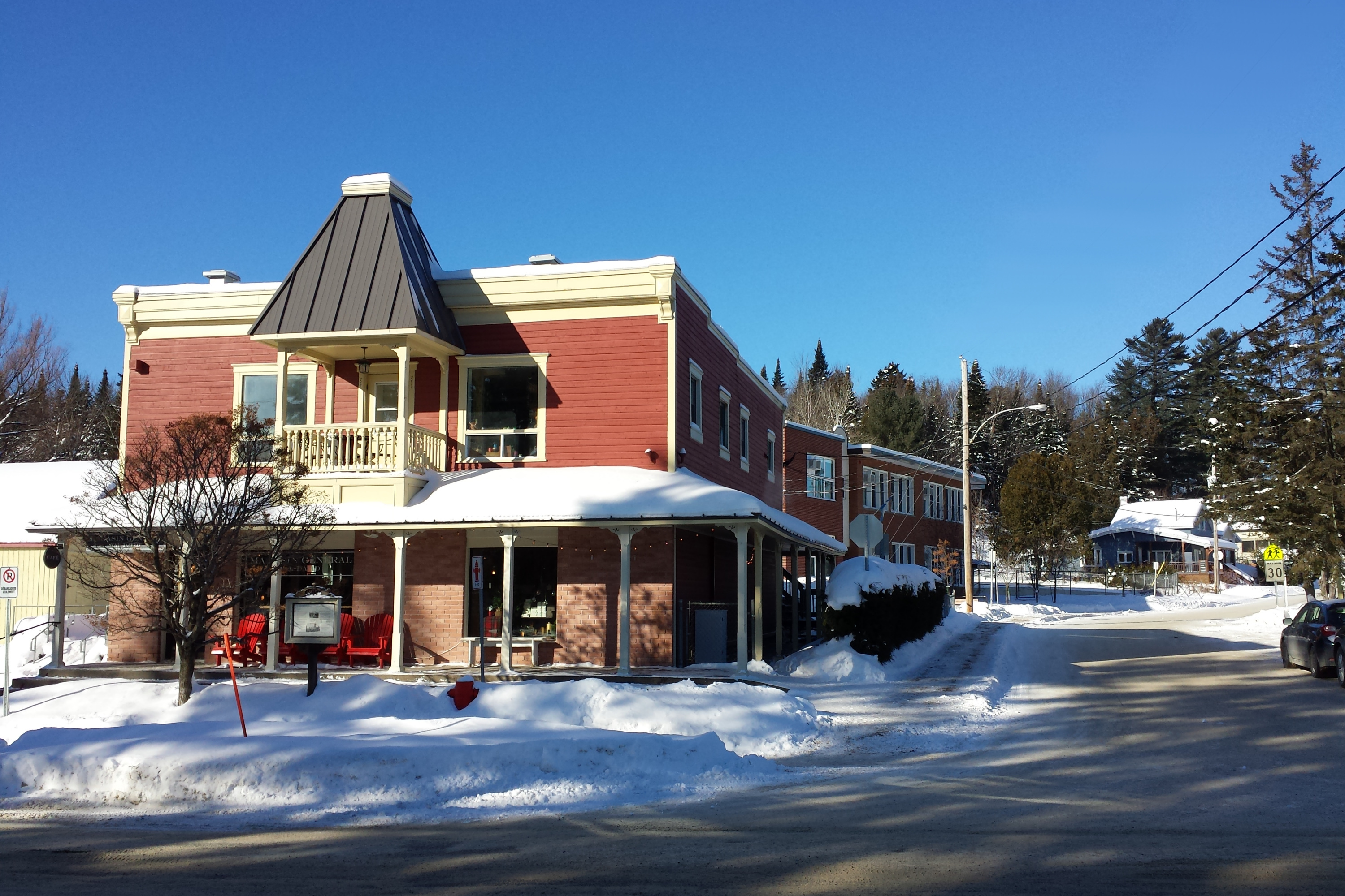 Val-David, Quebec, Canada